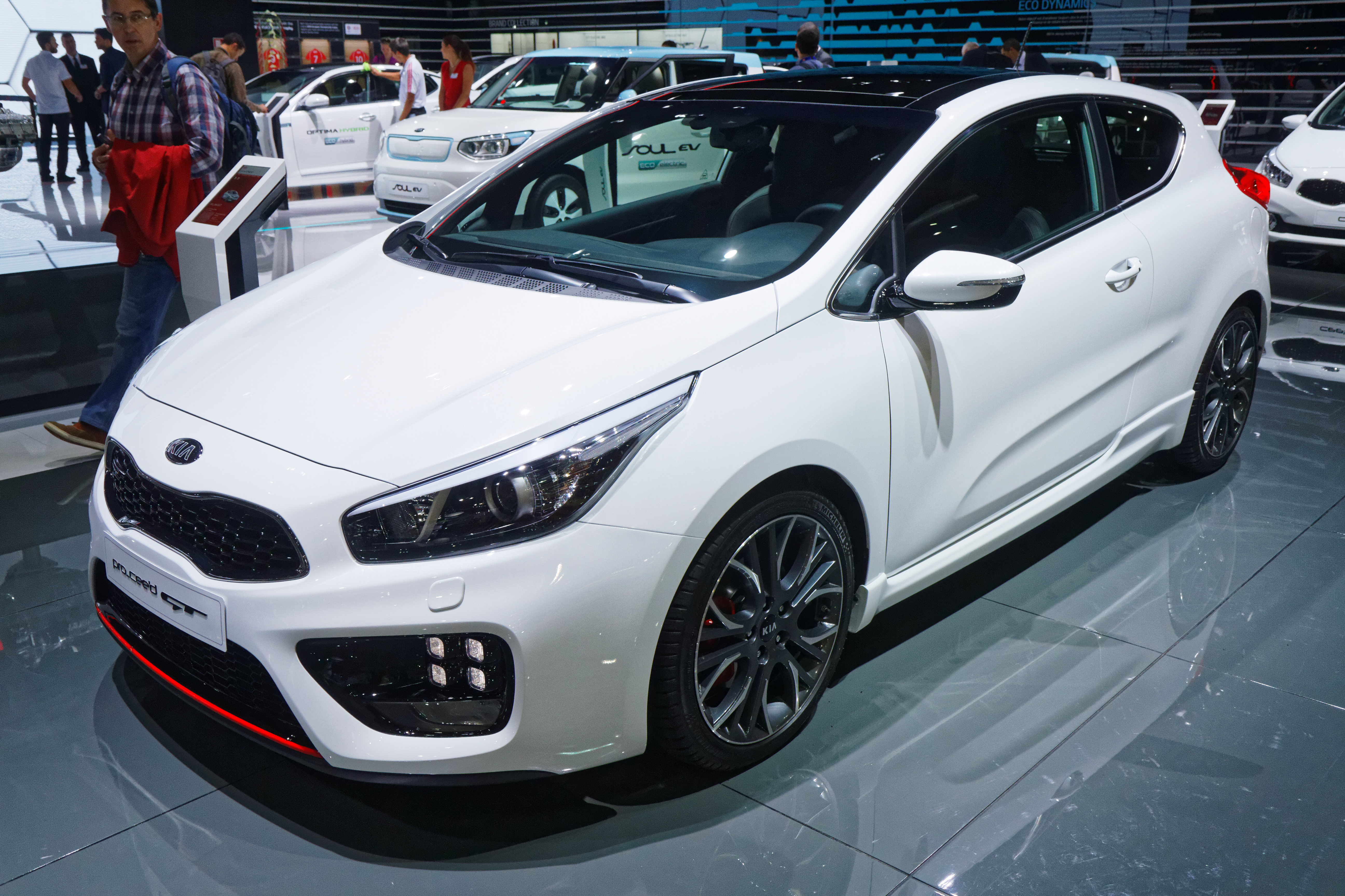 Une Kia Pro Ceed GT présentée lors du mondial de l'automobile de Paris 2014.